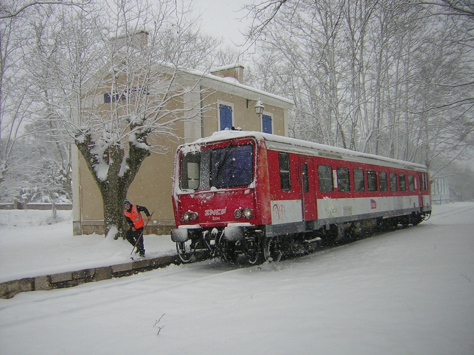 X-2204 devant la gare de Sainte-Anastasie-sur-Issole, sous la neige